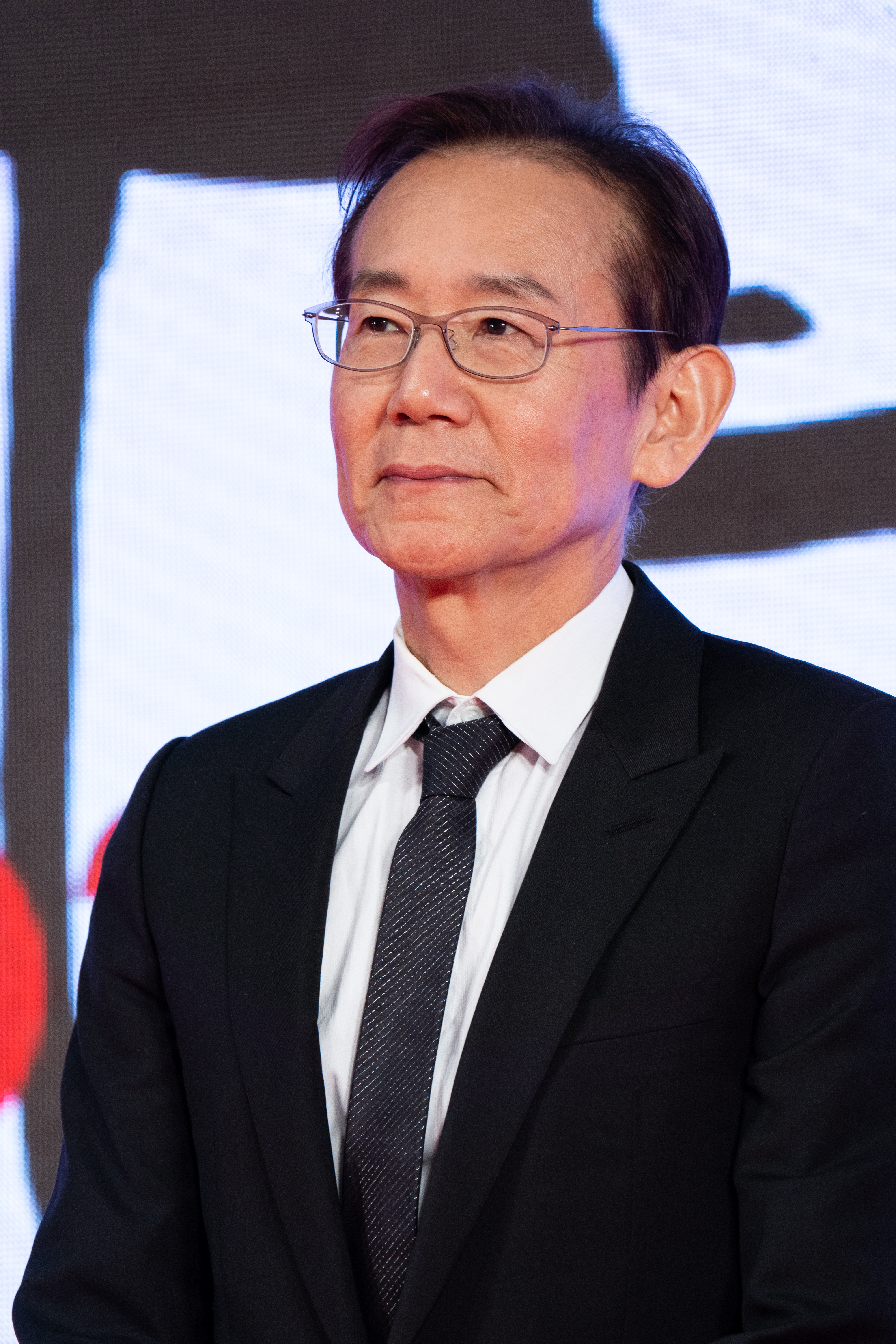 第32回 東京国際映画祭 オープニングセレモニー 周防正行 (カツベン!)